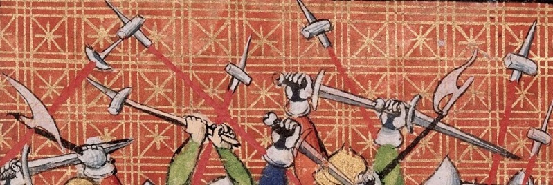 extrait d'une miniature du XVè siècle : les Maillotins